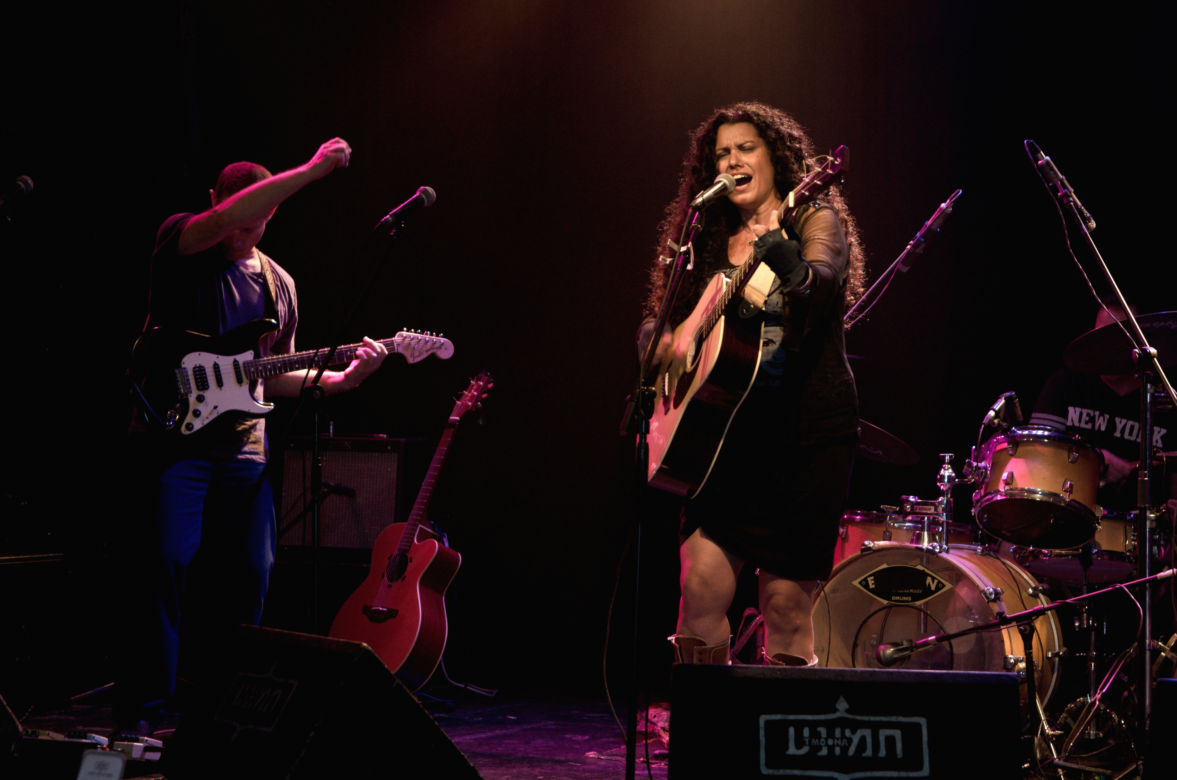 פזית נוני בהופעה בתמונע 25.8.12